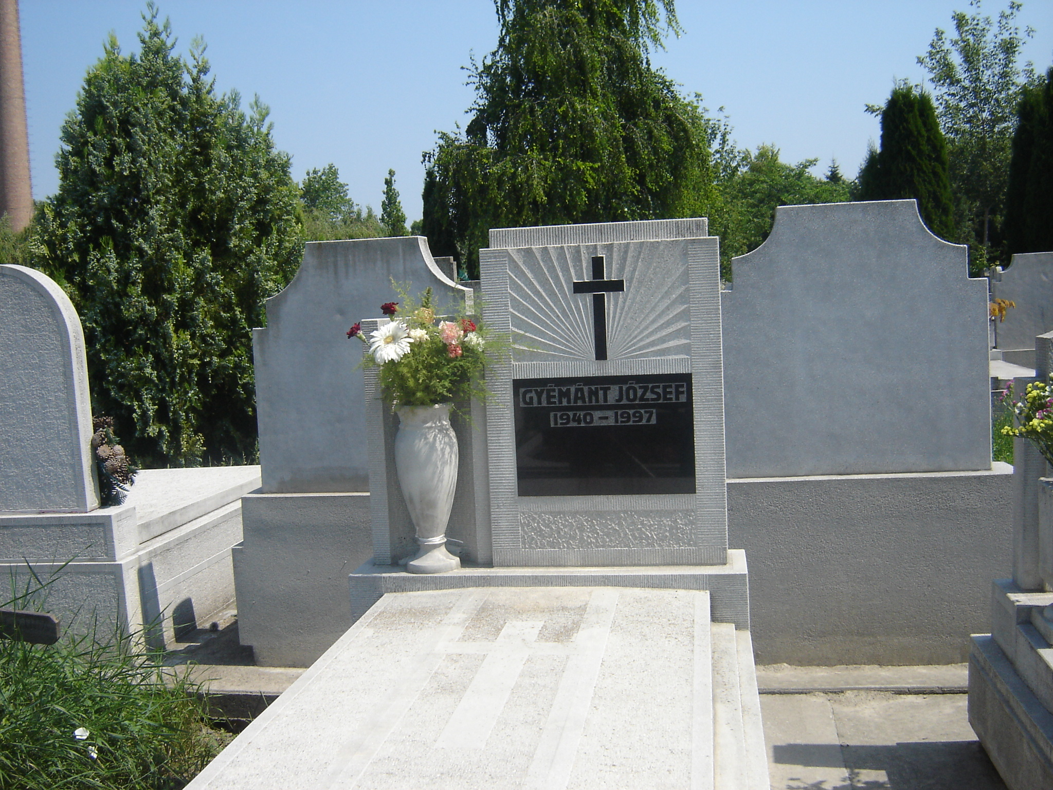 Napsugaras síremlék. Ekletikus sírkő, amely őrzi a napsugár motívumot, nem egyszerűen legyező, jól kirajzolódik egy fél nap sugarainak az íve. A neobarokk mellett inkább a klasszicizáló törekvés érvényesül (Szeged-alsóvárosi temető)